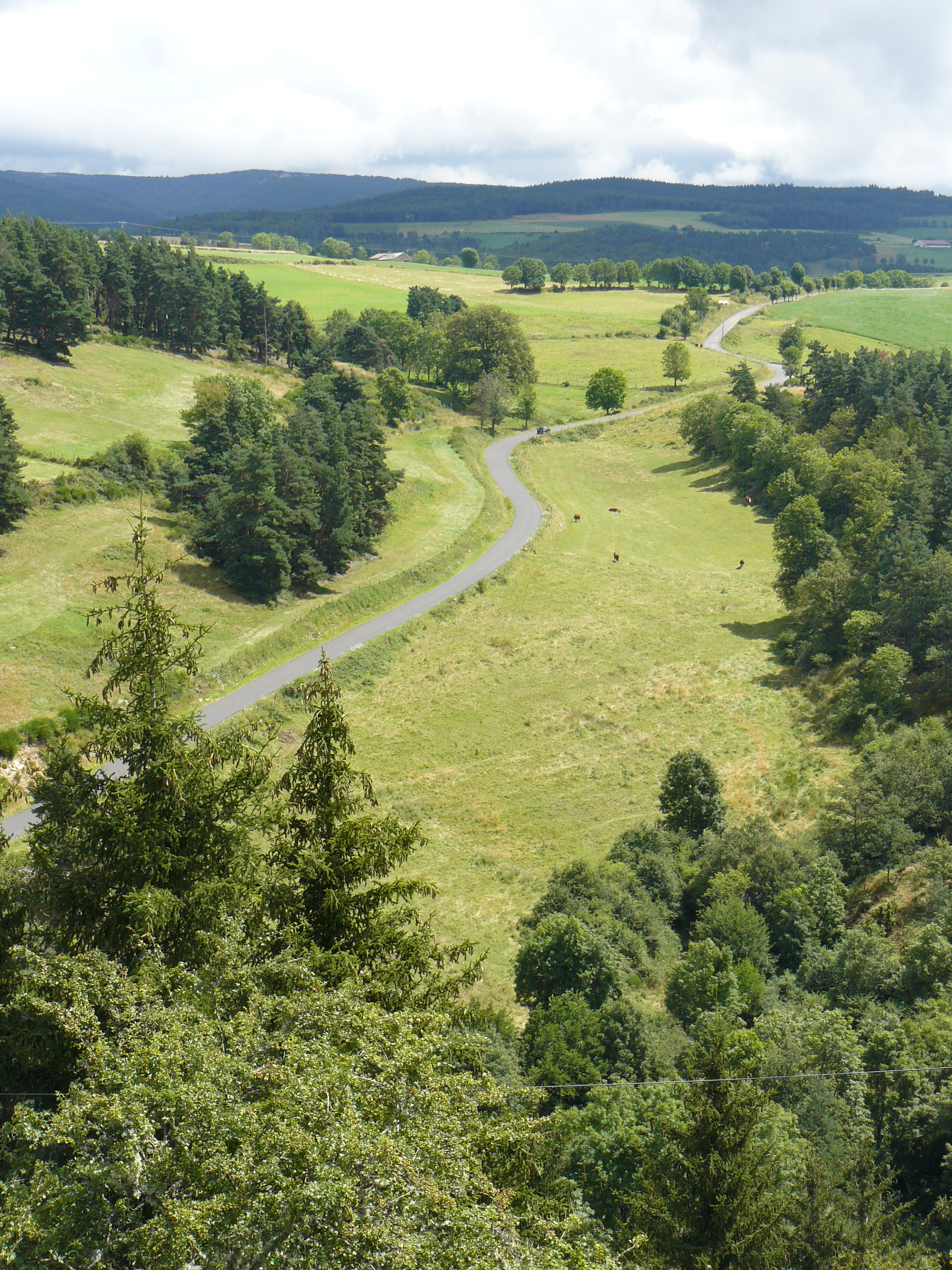 Paysage de Margeride, vu de Ruynes-en-Margeride (Cantal)